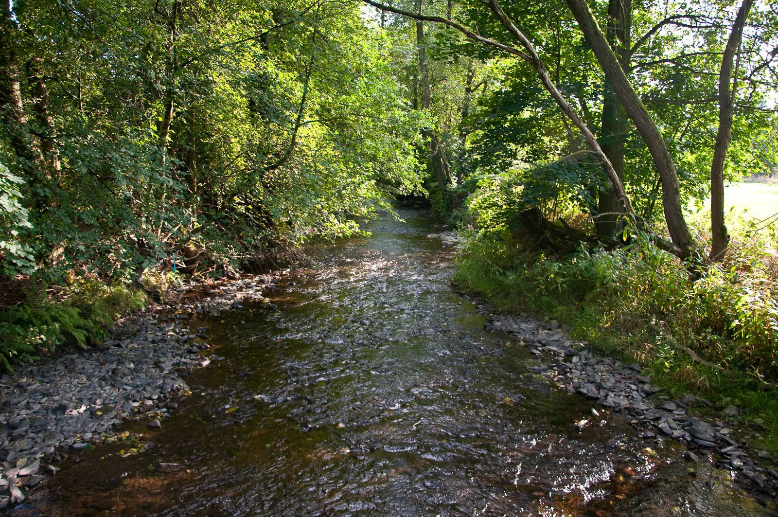 Steinach bei Heubisch